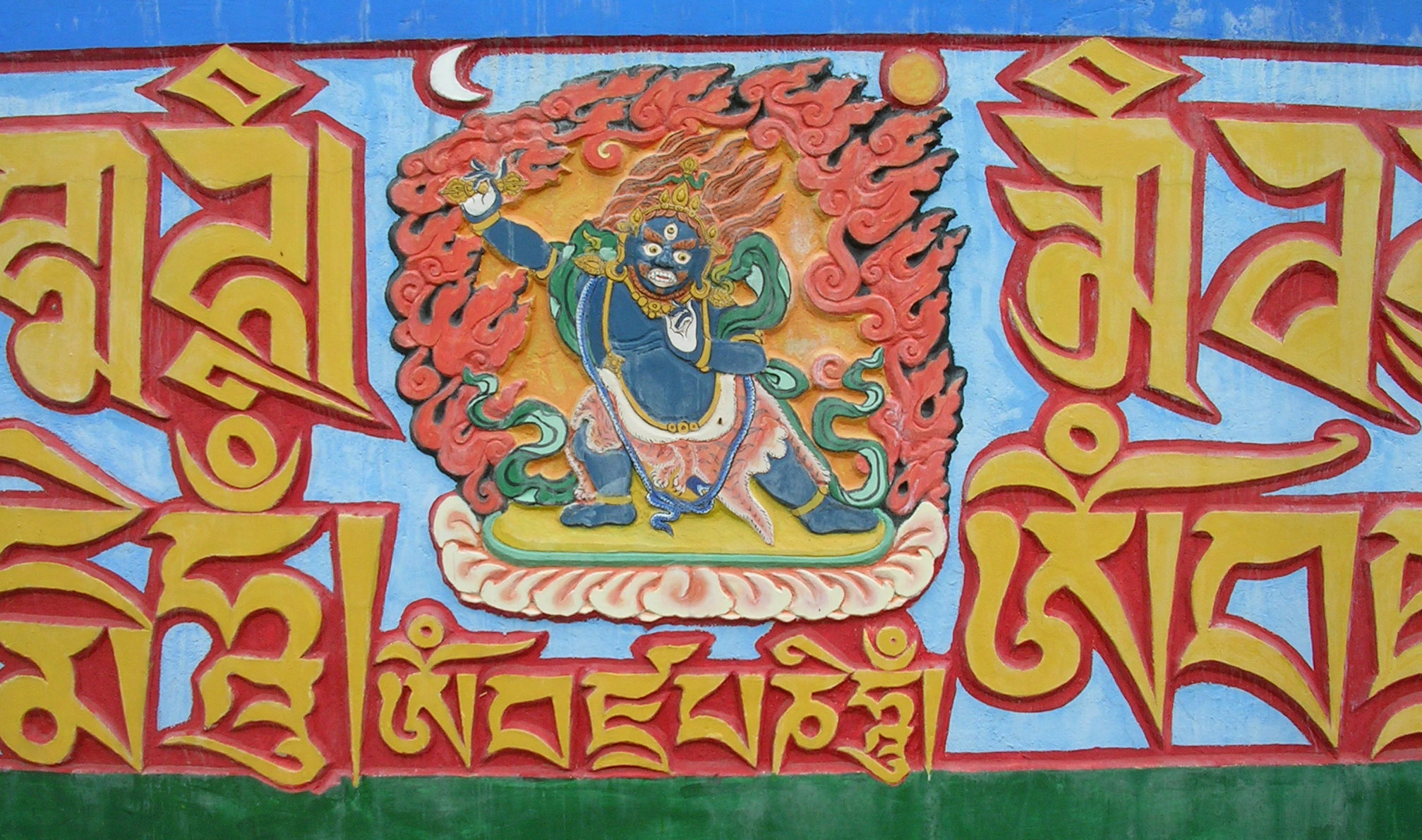 Maha cala en dag Shang Kagyü